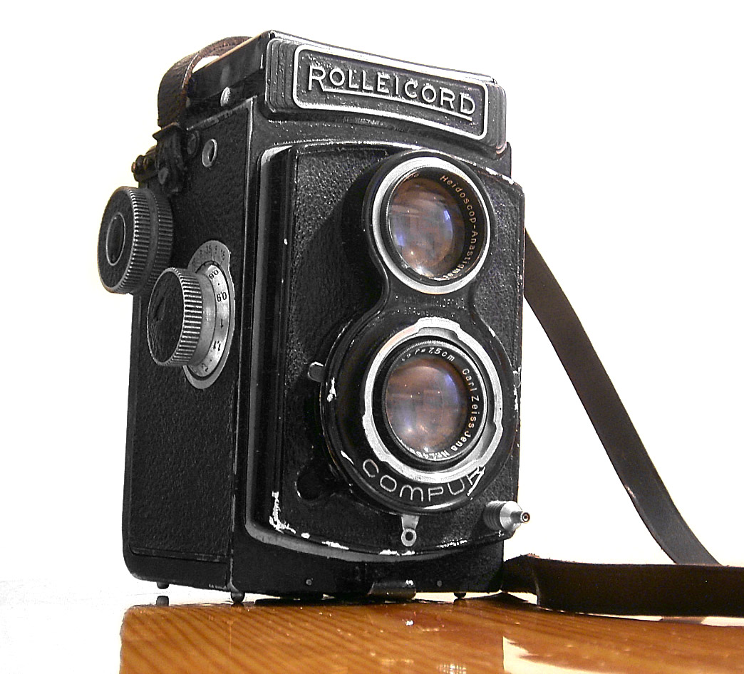 Fotoapparat Rolleicord ca. 1960